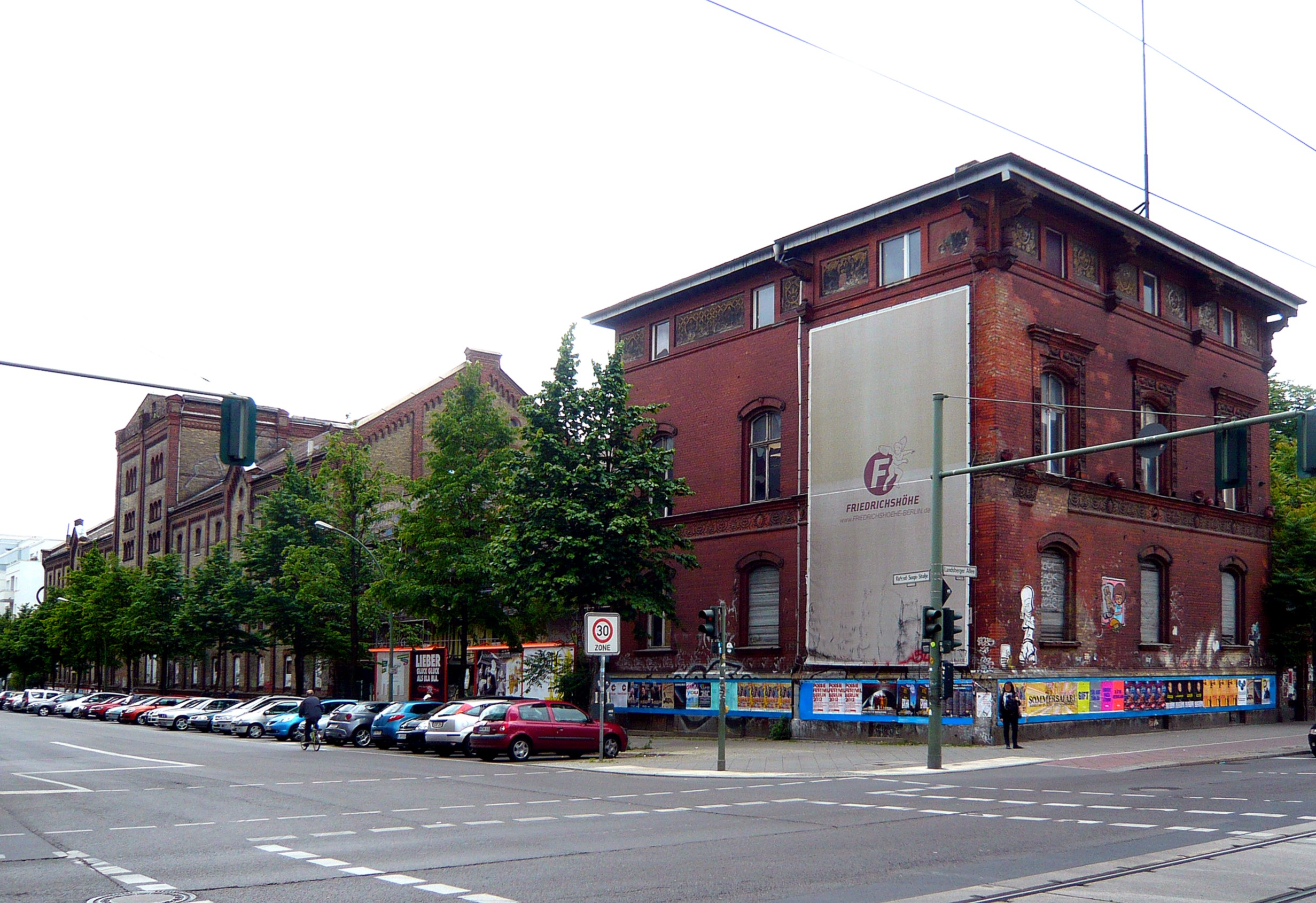 Berlin-Friedrichshain, ehemalige Brauerei Patzenhofer-Schultheiß, Baudenkmale in der Richard-Sorge-Straße Ecke Landsberger Allee